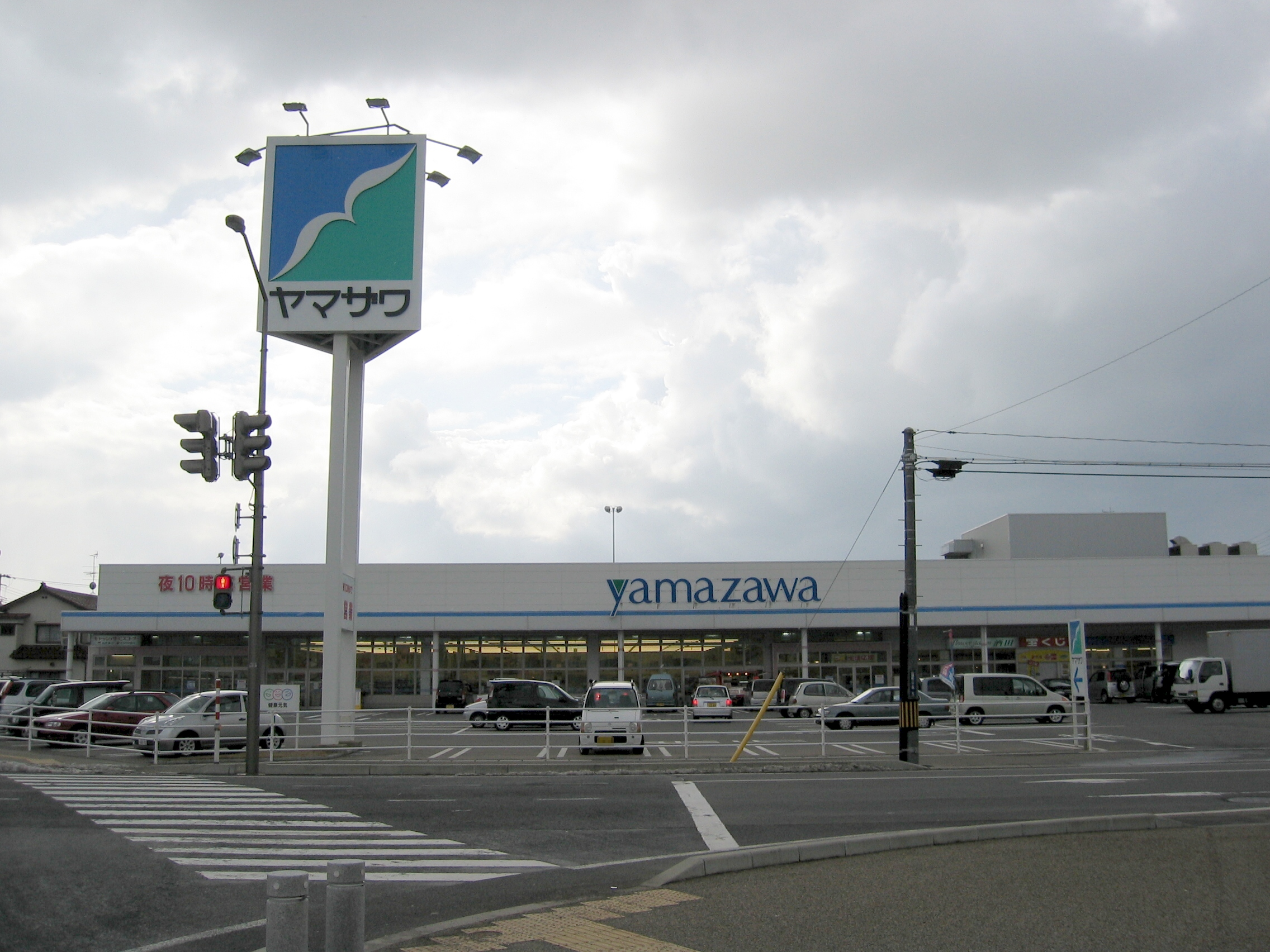 ヤマザワ 山居町店